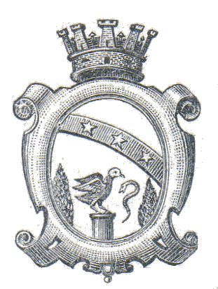 Stemma antico del Comune di San Bartolomeo in Galdo